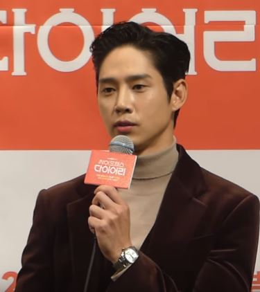 13일 오후 서울시 강남구 논현동 임피리얼 팰리스 서울에서 tvN 새 수목드라마 '싸이코패스 다이어리’ 제작발표회가 열려 배우 박성훈이 기자 질의 응답을 하고 있다.